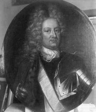 Norsk (bokmål): Portrett av Casper Hausmann (1653-1718), dansk-norsk general, trelasthandler og godseier. Begravet i krypten under Oslo domkirke. Eier: Norsk Folkemuseum